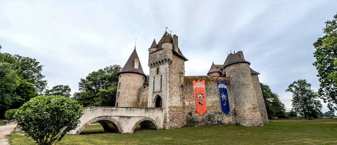 c'est le chateau de ecole aventure